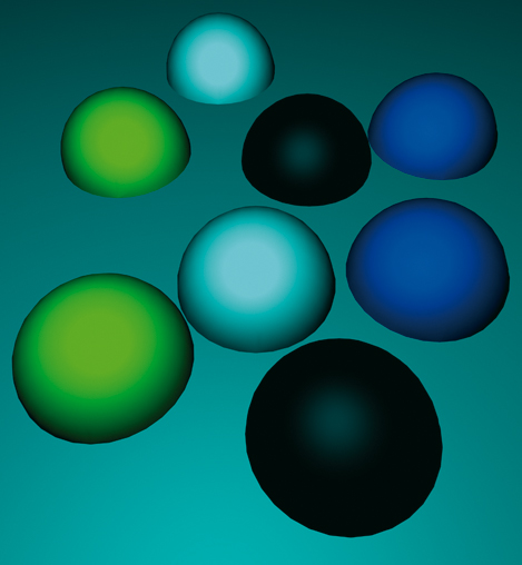 Adibide hauekin ikusten dugu nola argiaren koloreak objektuen koloreen perzepzioa aldatzen du. Horregaitik ondorioztatzen dugu: 1.- Azal zuriek argiaren kolorea hartzen dute zuri koloreak argiaren kolorea aldatzen ez duelako. Argi zuriak ere ez du objektu azaleen kolorea aldatzen. 2.- Argia koloreztatuak kolore bereko azal baten gainean ez du objektuaren kolorea aldatzen. 3.- Azal batean beltza ikusiko dugu baldin eta jotzen duen argiak badu hain zuzen ere azal horrek errebotatzen ez duen argi espektroren zatia (kolorea). Argi horiaren irudian, kasu, beltza bada bola urdina horrek espektro osoa hartzen du urdina izan ezik. 4.- Azal batean ikusten dugun kolorea nahasketa kengarria da non argiaren argi espektroari azalak hartzen duen espektro horren zatia kentzen diogun.